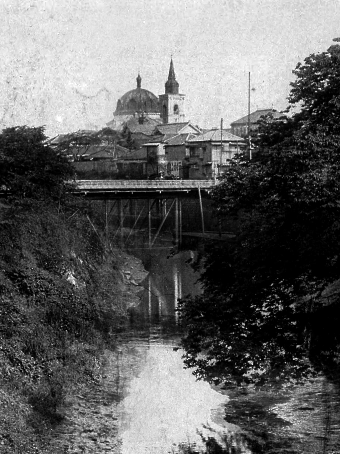 創建当時のニコライ堂（北西からの遠望）